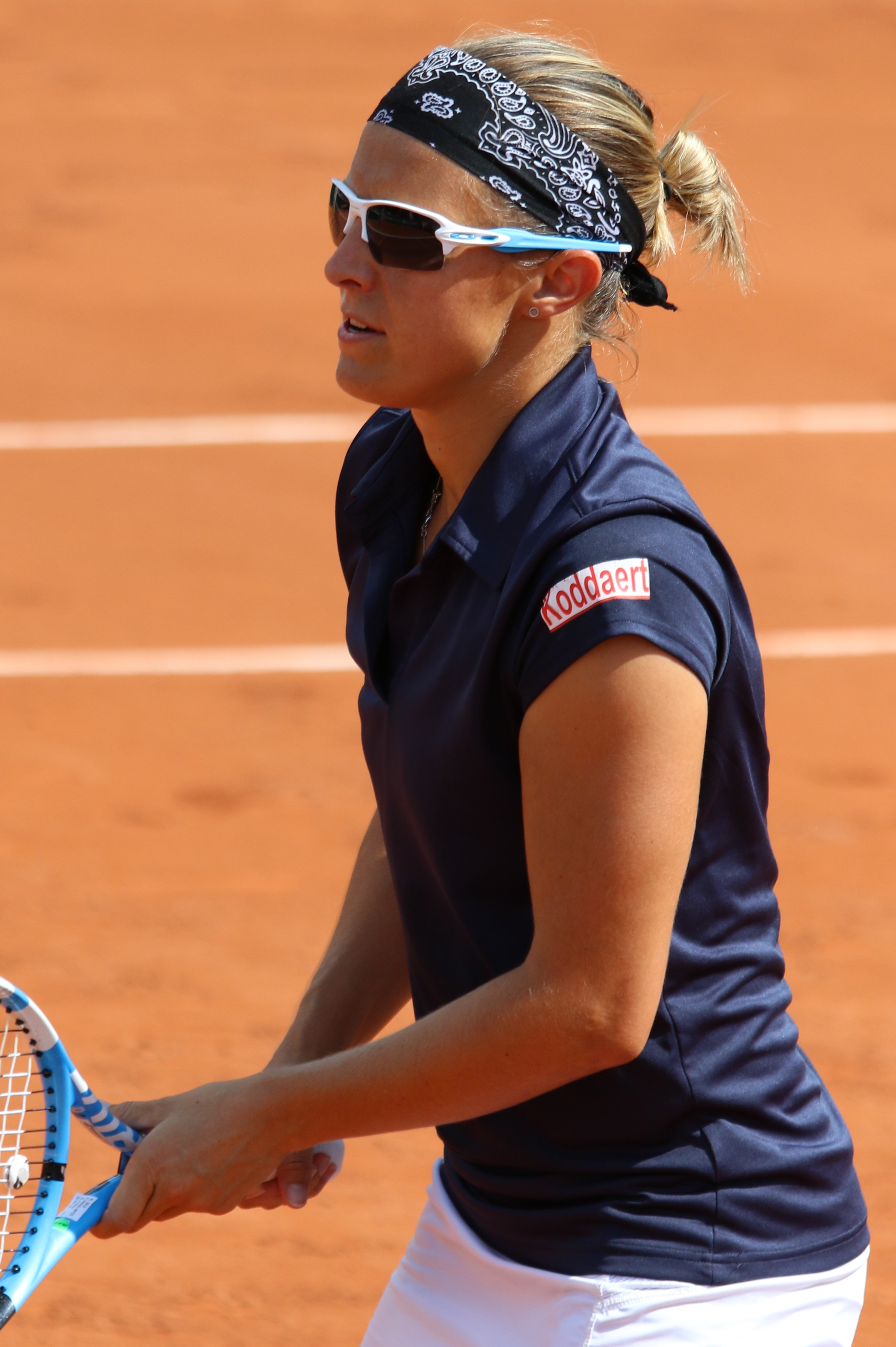 Flipkens RG18 (13)